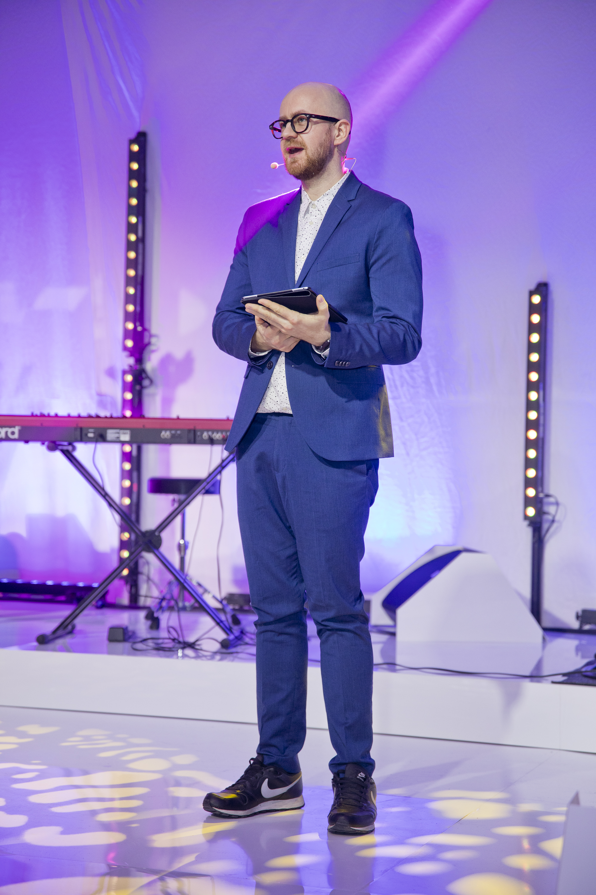 Veiko Tubin, Eesti muuseumide aastaauhindade üleandmise õhtujuht